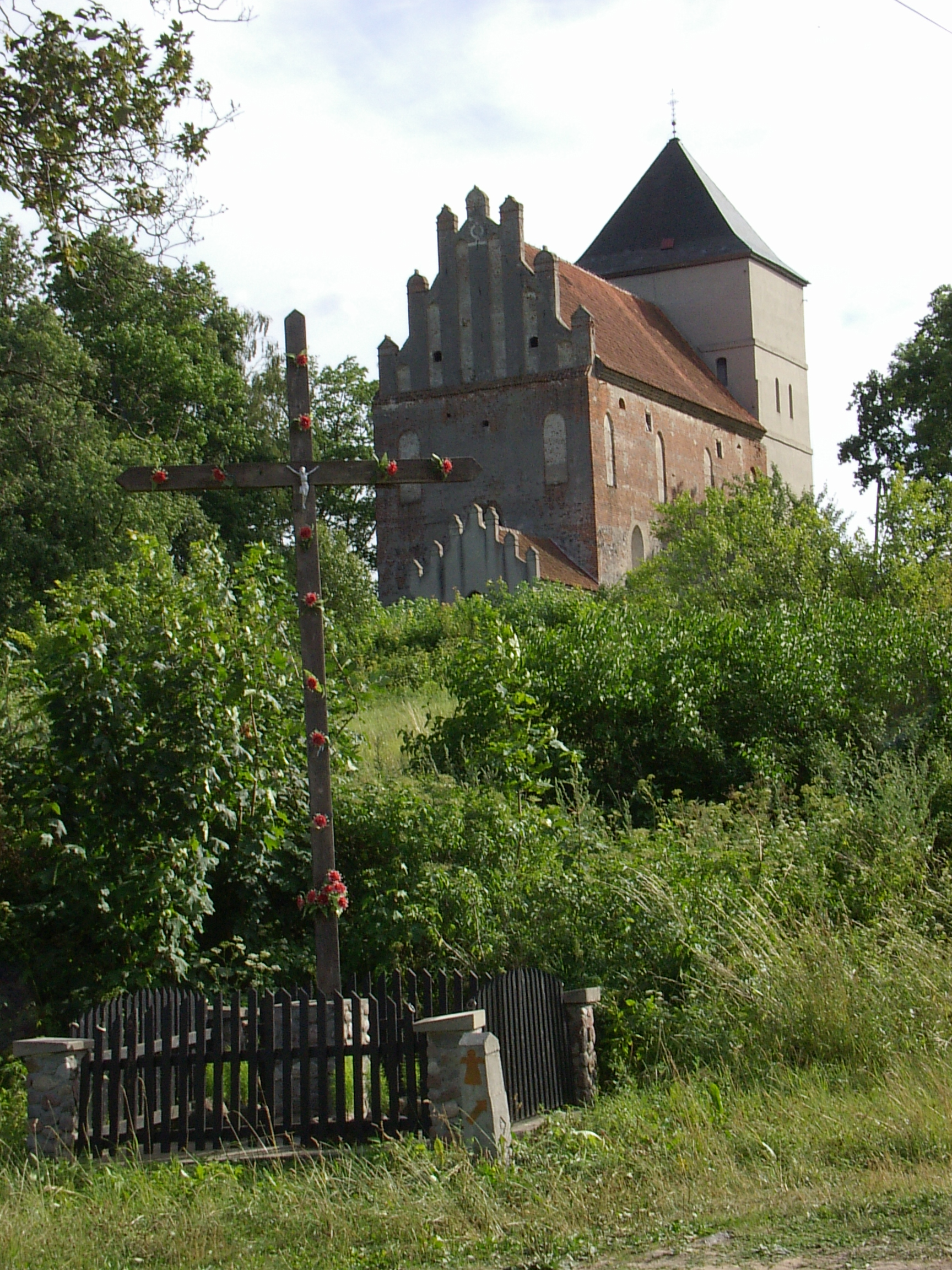 Pokrzyżacki kościół w Bezławkach. After-Teutonic Knights church in Bezławki.